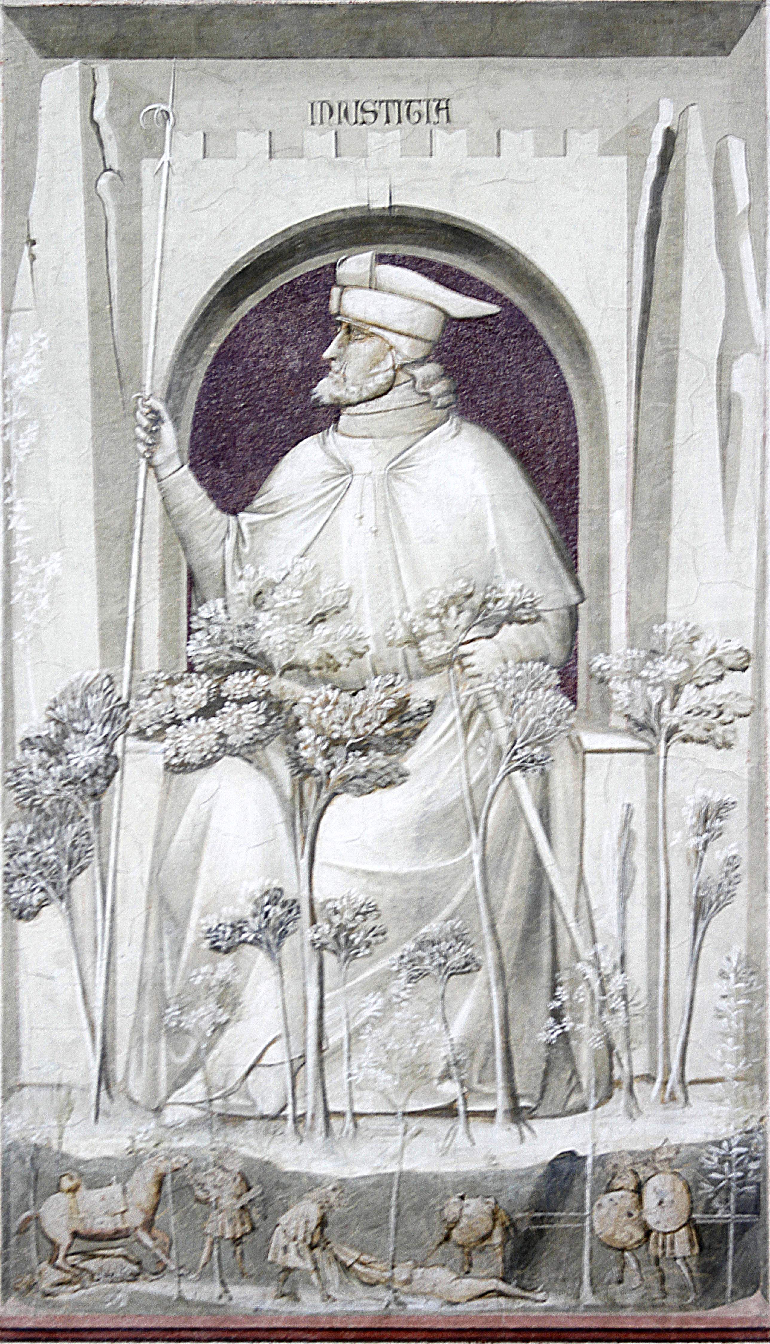 Capella dei Scrovegni - Padua